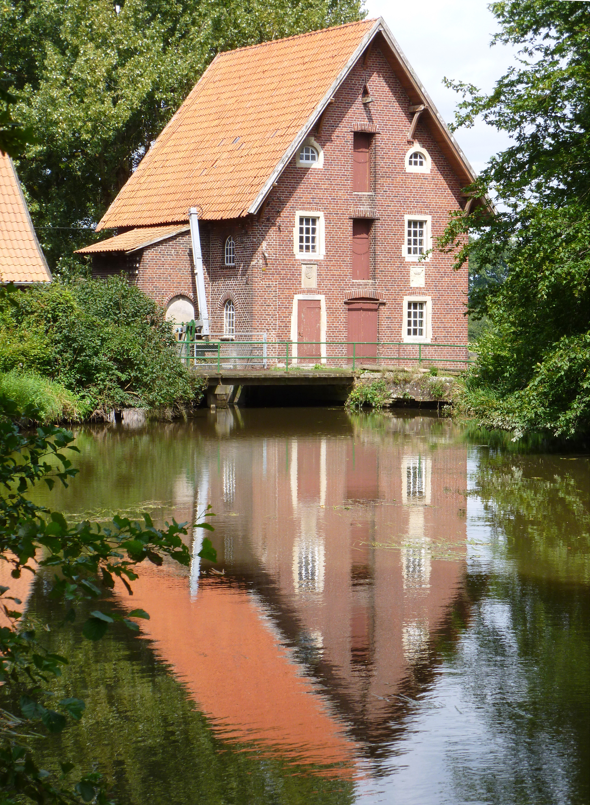 Düstermühle in Legden-Wehr, Wehr 252 This is a photograph of an architectural monument.